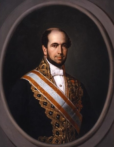 Retrato del político español Melchor Ordóñez Viana (1811-1860), que nació en Málaga y llegó a ser gobernador civil de Valencia y ministro de la Gobernación durante el reinado de Isabel II de España.